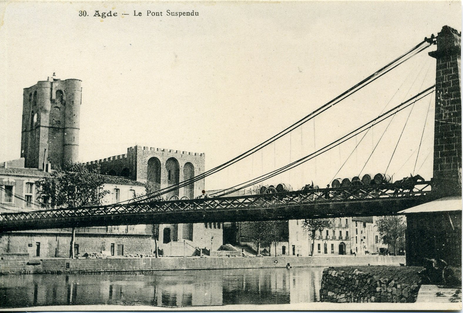 Le pont suspendu d'Agde (Hérault, France).